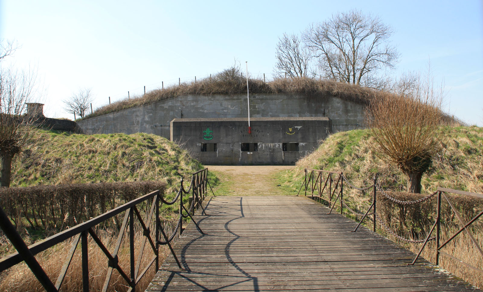 Fort Penserdijk, (batterij). "Stelling van de monden der Maas en van het Haringvliet".